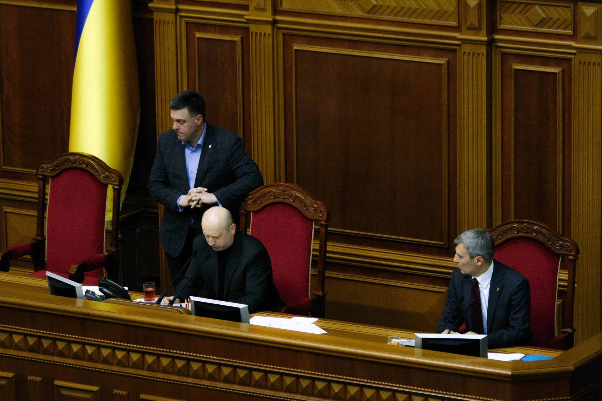 In Parliament